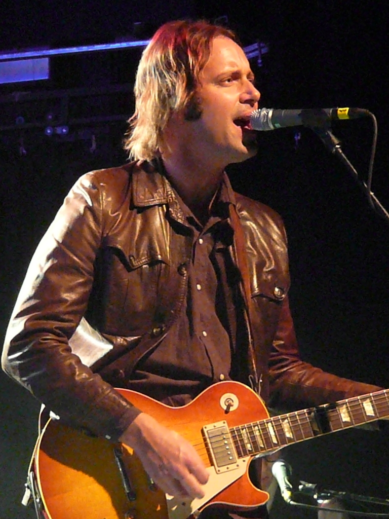 Neal Casal